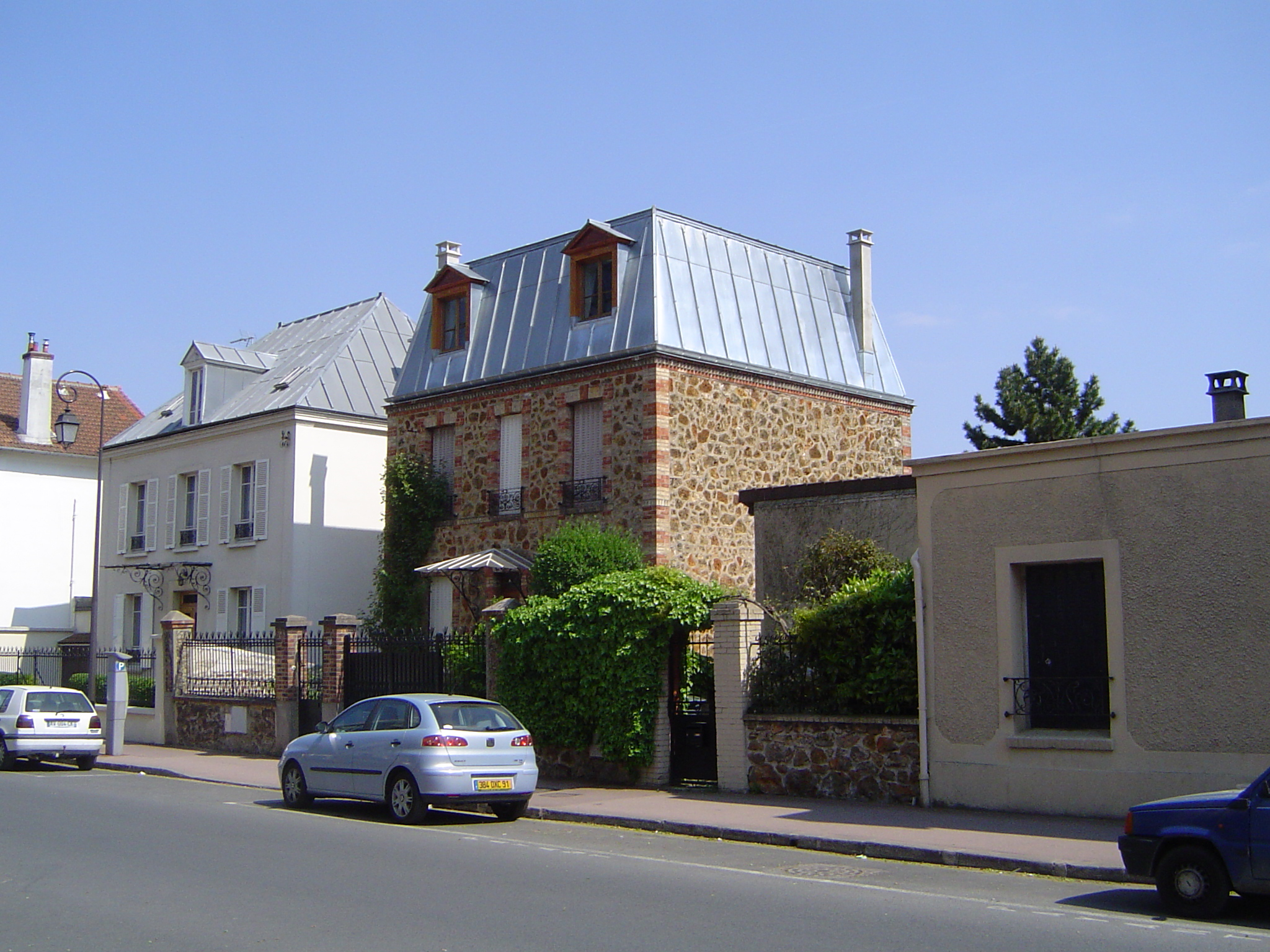 Photo prise à Antony (France)